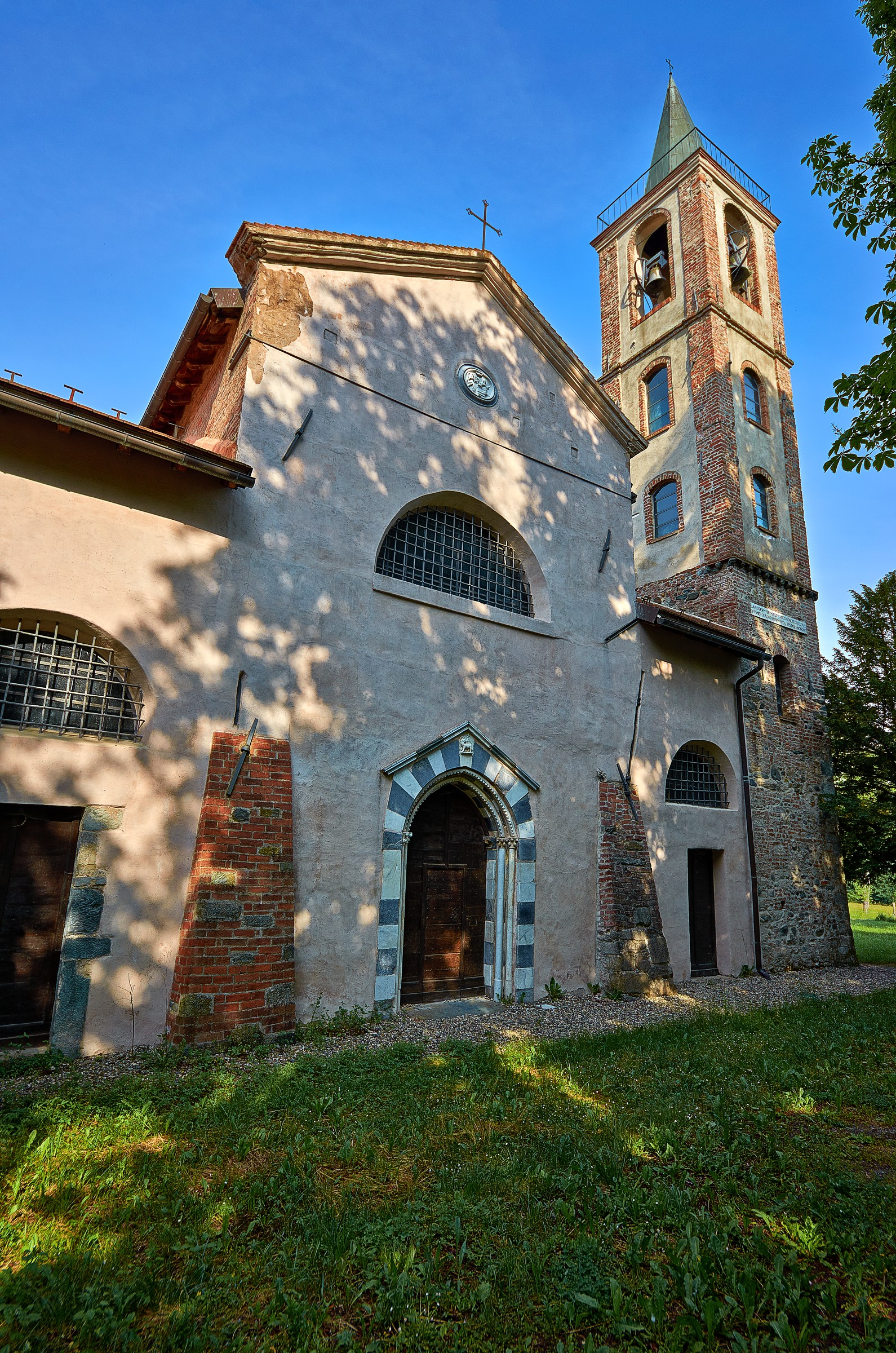 Abbazia di Santa Maria alla Croce, lato Est